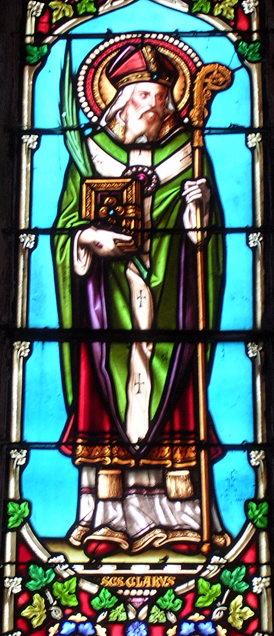 Vitrail de saint Clair d'Aquitaine (Sanctus Clarus) dans l'église de Saint-Paul-en-Born (Landes, France)